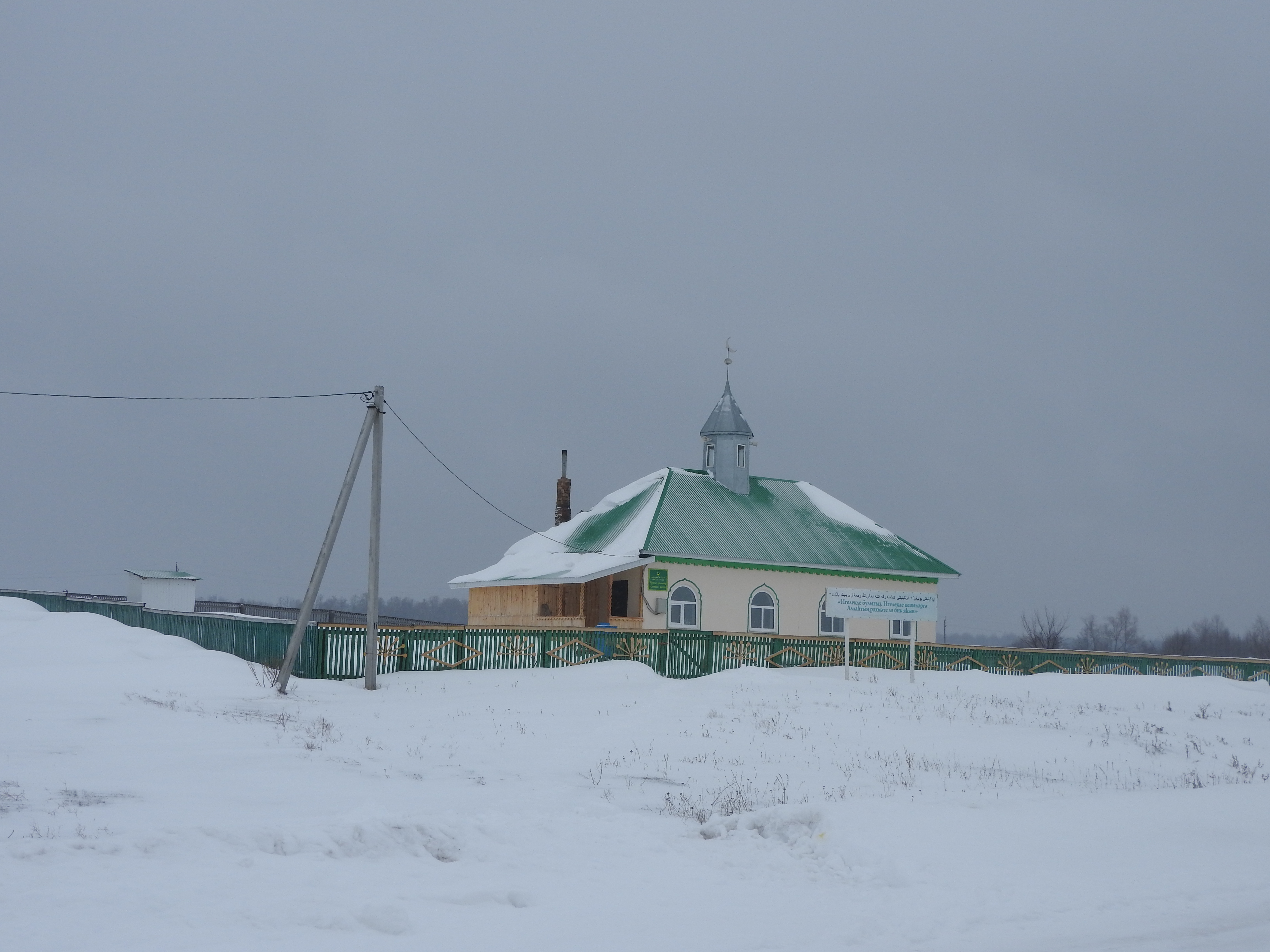 Мечеть в Явгильдах